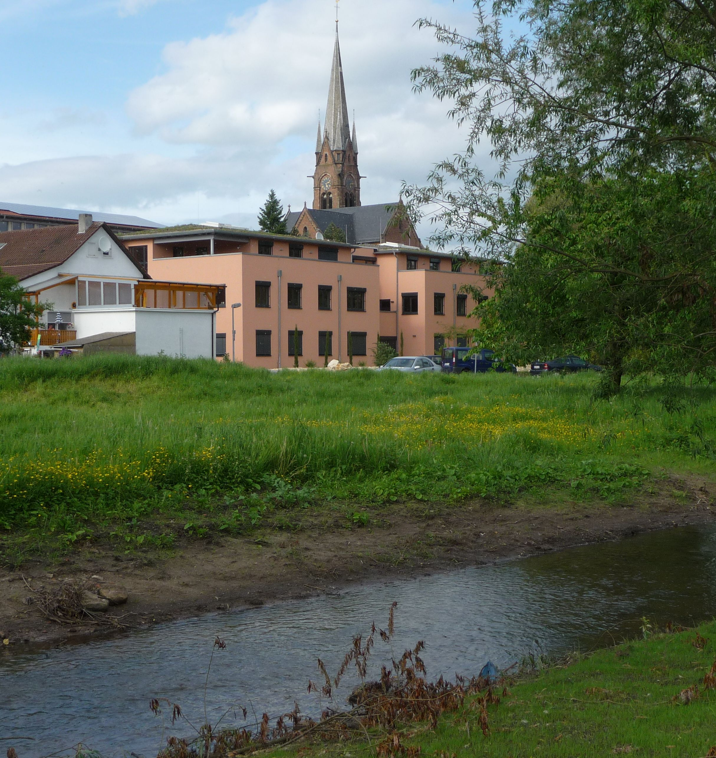 Eisbach, Azurit Hansa Zentrale und protestantische Kirche